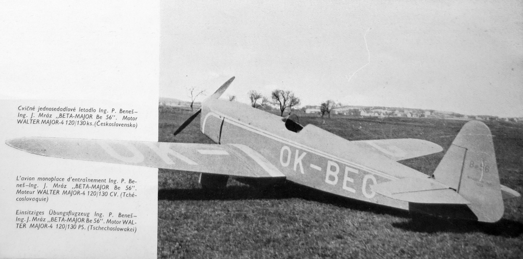 letecký motor Walter Major 4 a letoun Be-56 Beta Major (1936)